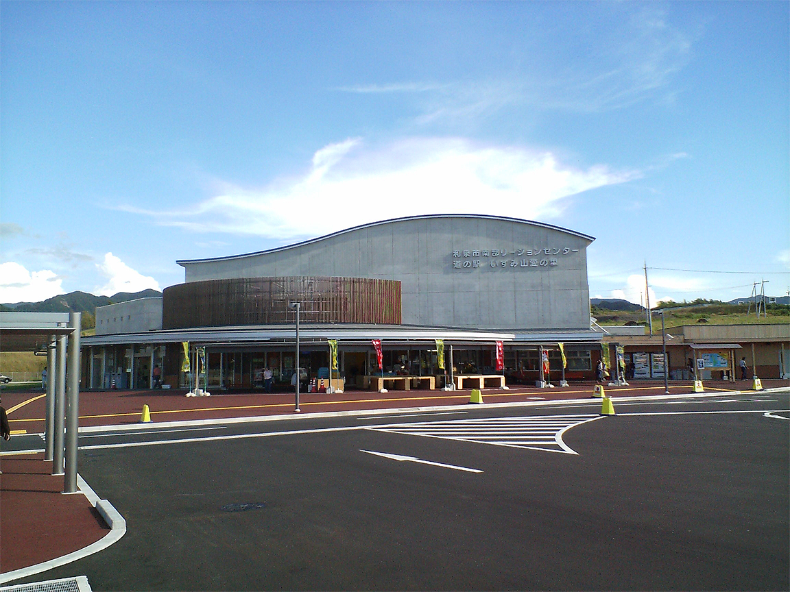 投稿者自身が『和泉市立南部リージョンセンター』（大阪府和泉市仏並町398-1）を撮影。